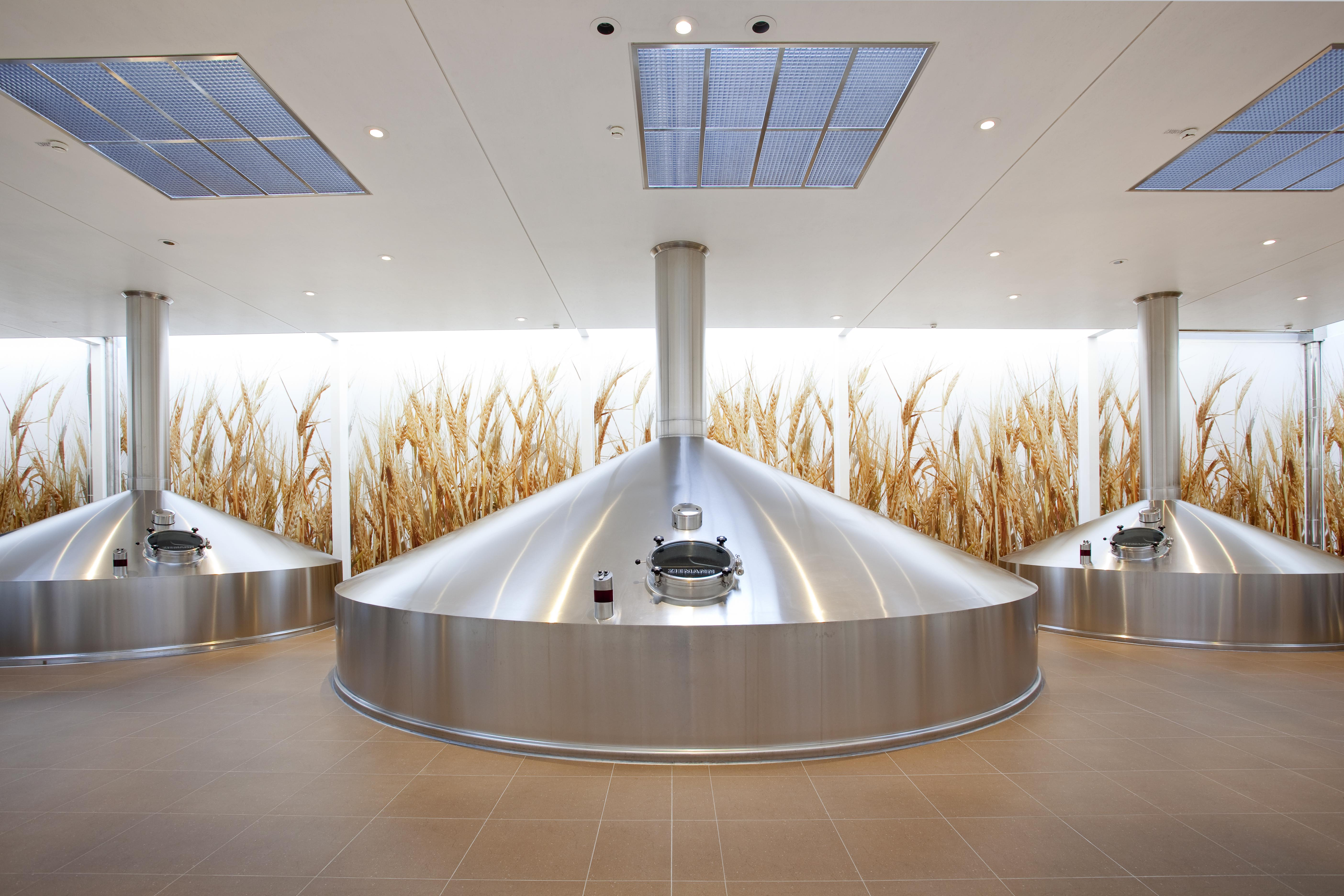 Sudhauskessel